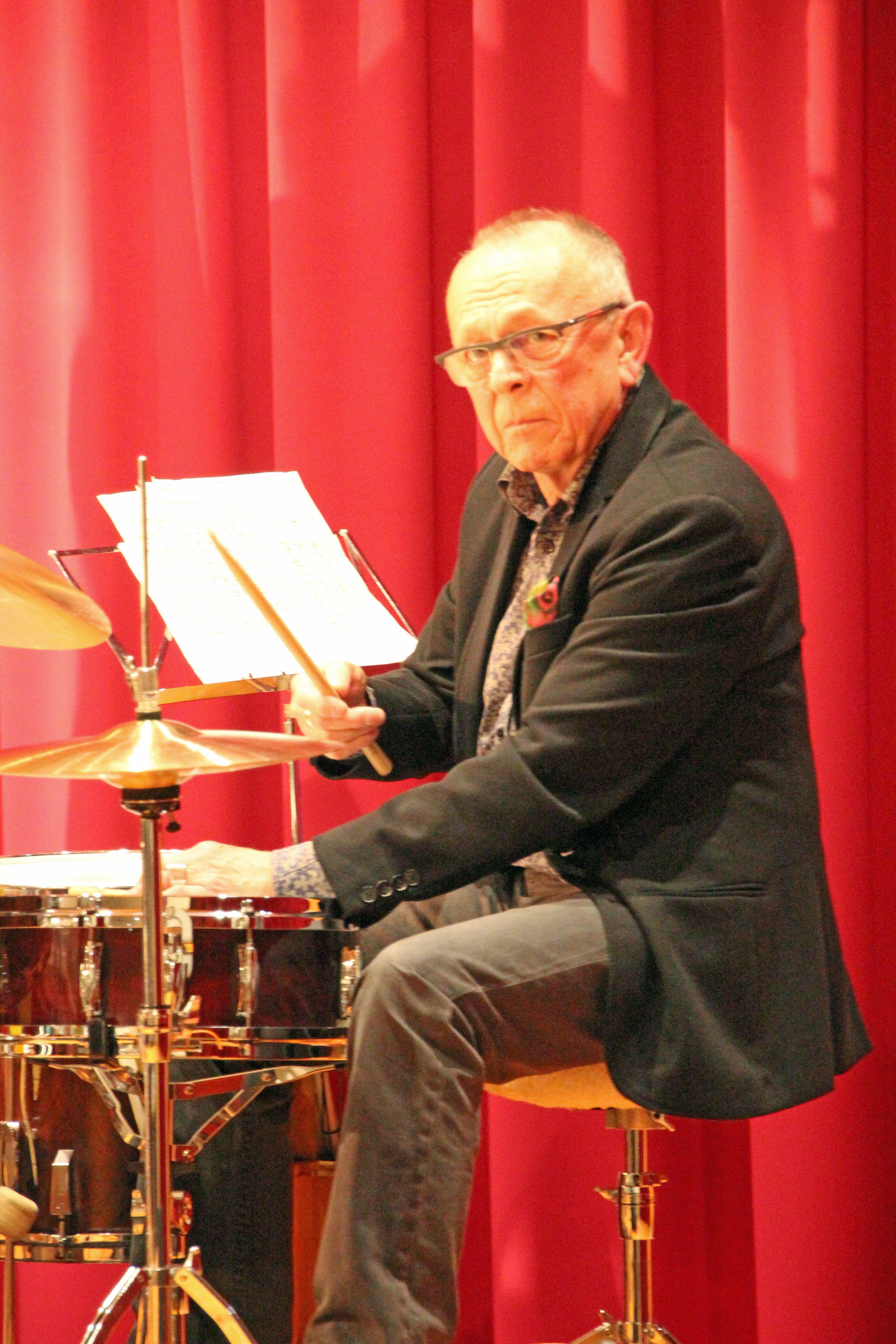 Bildinhalt: "Swing tanzen verboten". Gesprächskonzert mit Emil Mangelsdorff und seinem Quartett in der Stadtbibliothek Hanau. Emil Mangelsdorff - Altsaxophon, Uli Partheil - Piano, Jean-Philippe Walde - Bass, Janusz Stefanski - Drums Aufnahmeort: Hanau, Deutschland